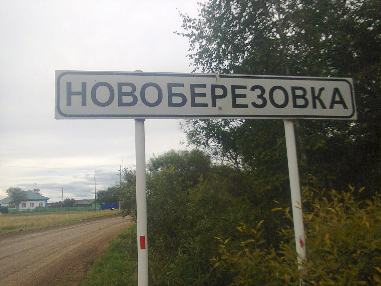 с.Новоберезовка